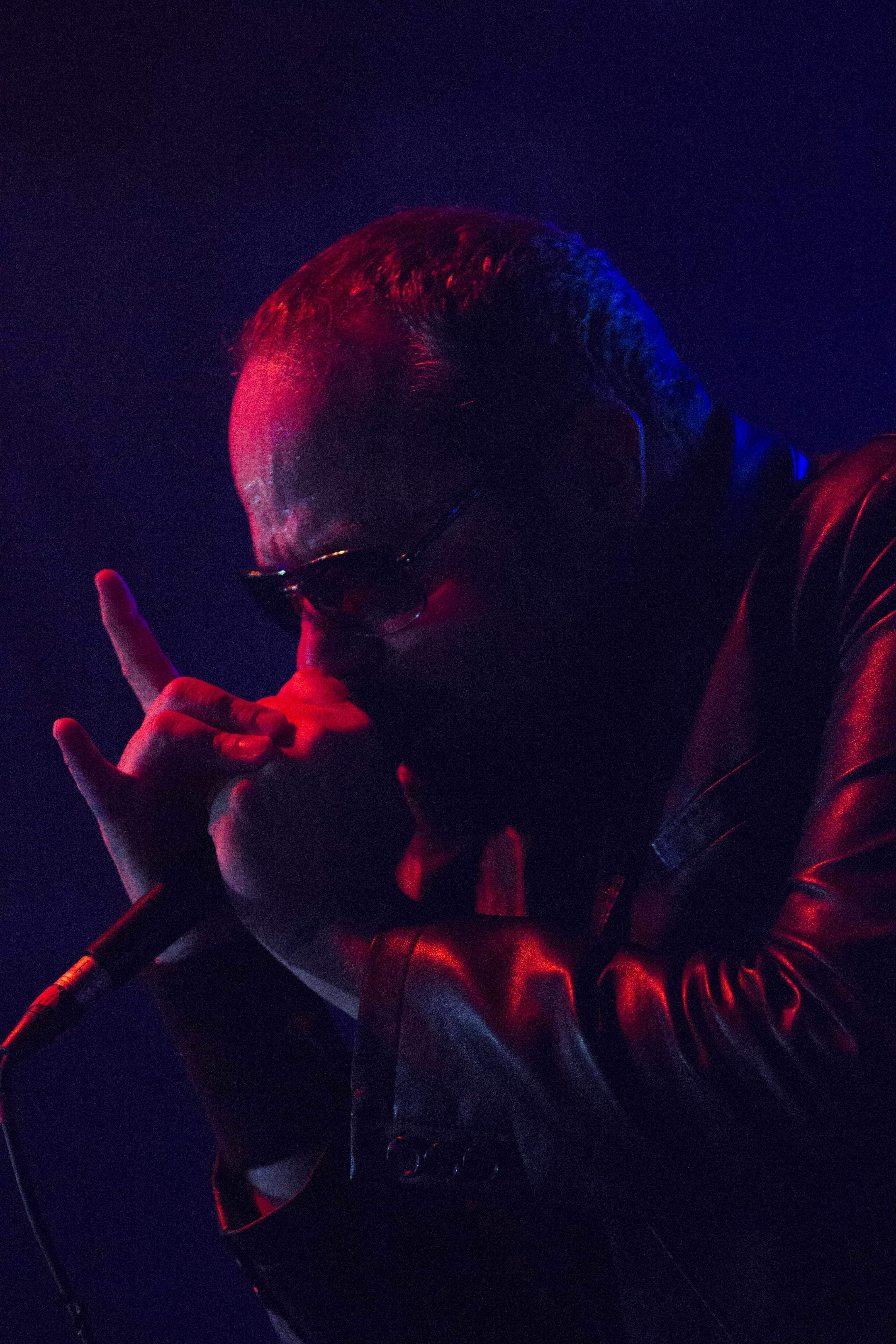 Tim Ripper Owens - Live Santiago, Chile 09-05-2017 ©MarianoBeuses